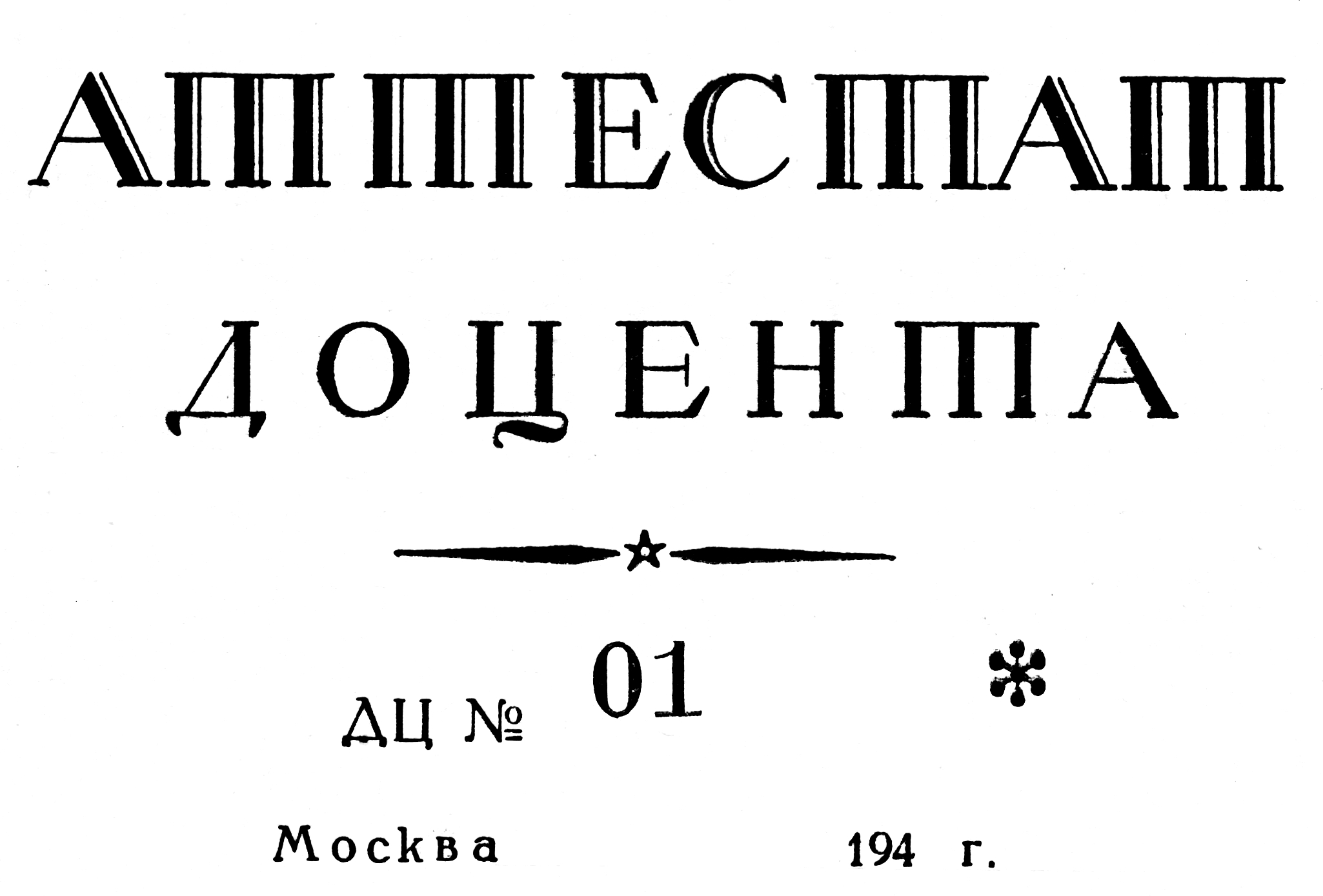 Аттестат доцента